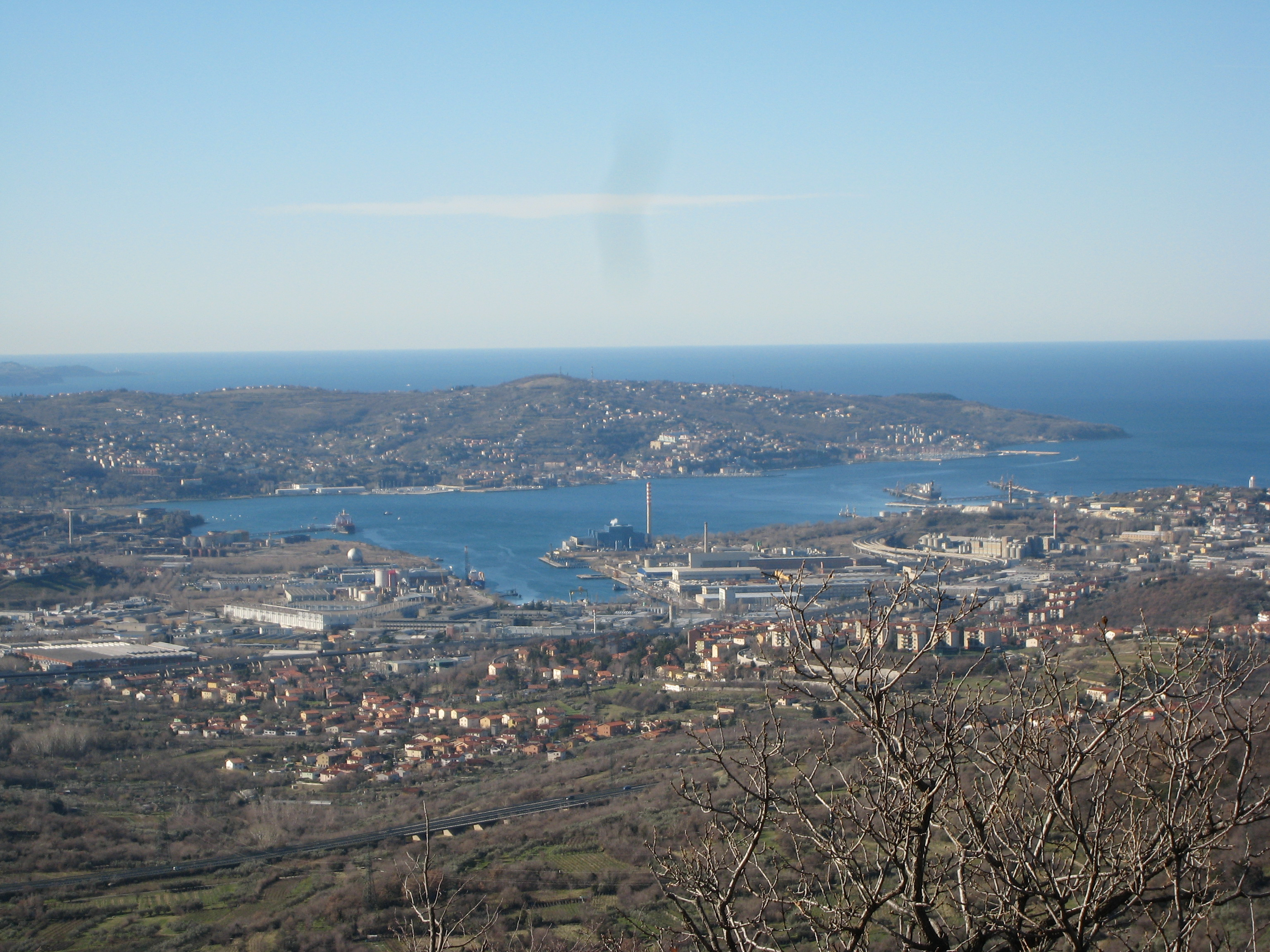 Trieste - Val Rosandra - Veduta verso il vallone di Muggia. Gennaio 2008